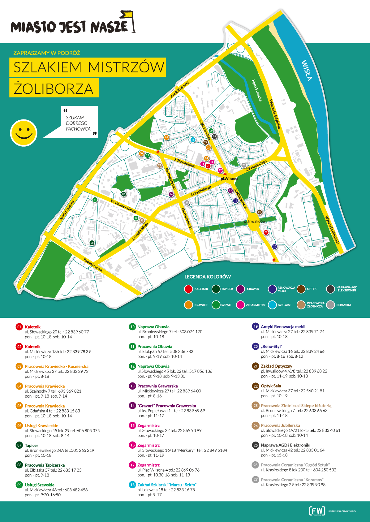 Mapa rzemieślników mających zakłady na Żoliborzu